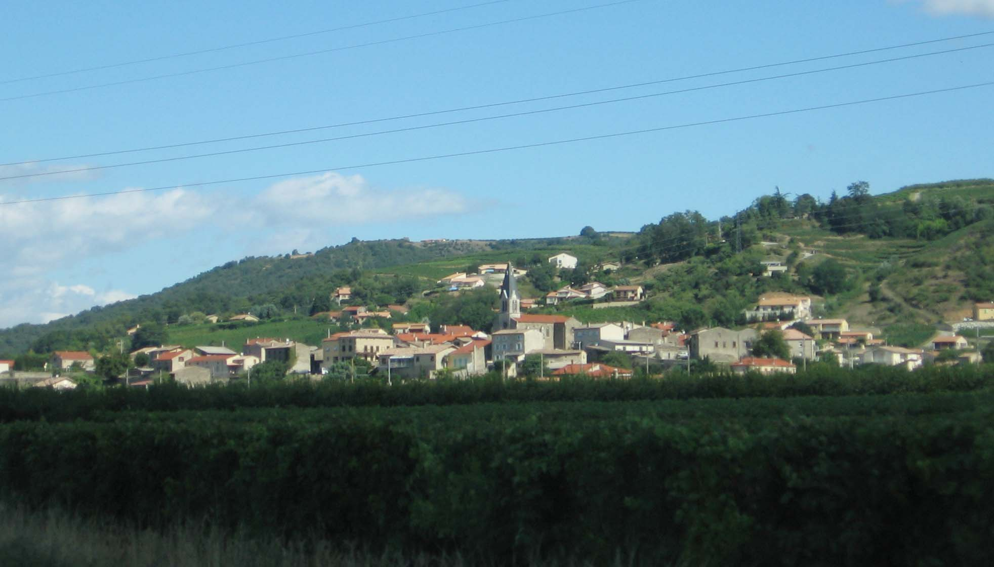 Gervans, France